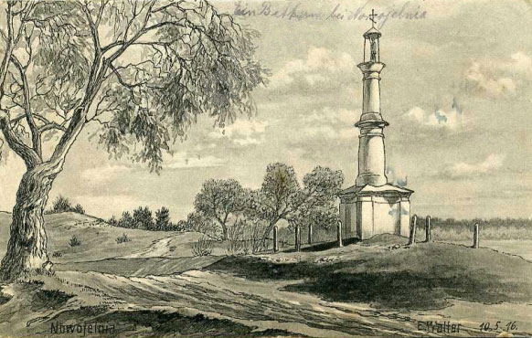 Беларуская (тарашкевіца): Наваельня (Navajelnia). Мэмарыяльная калёна